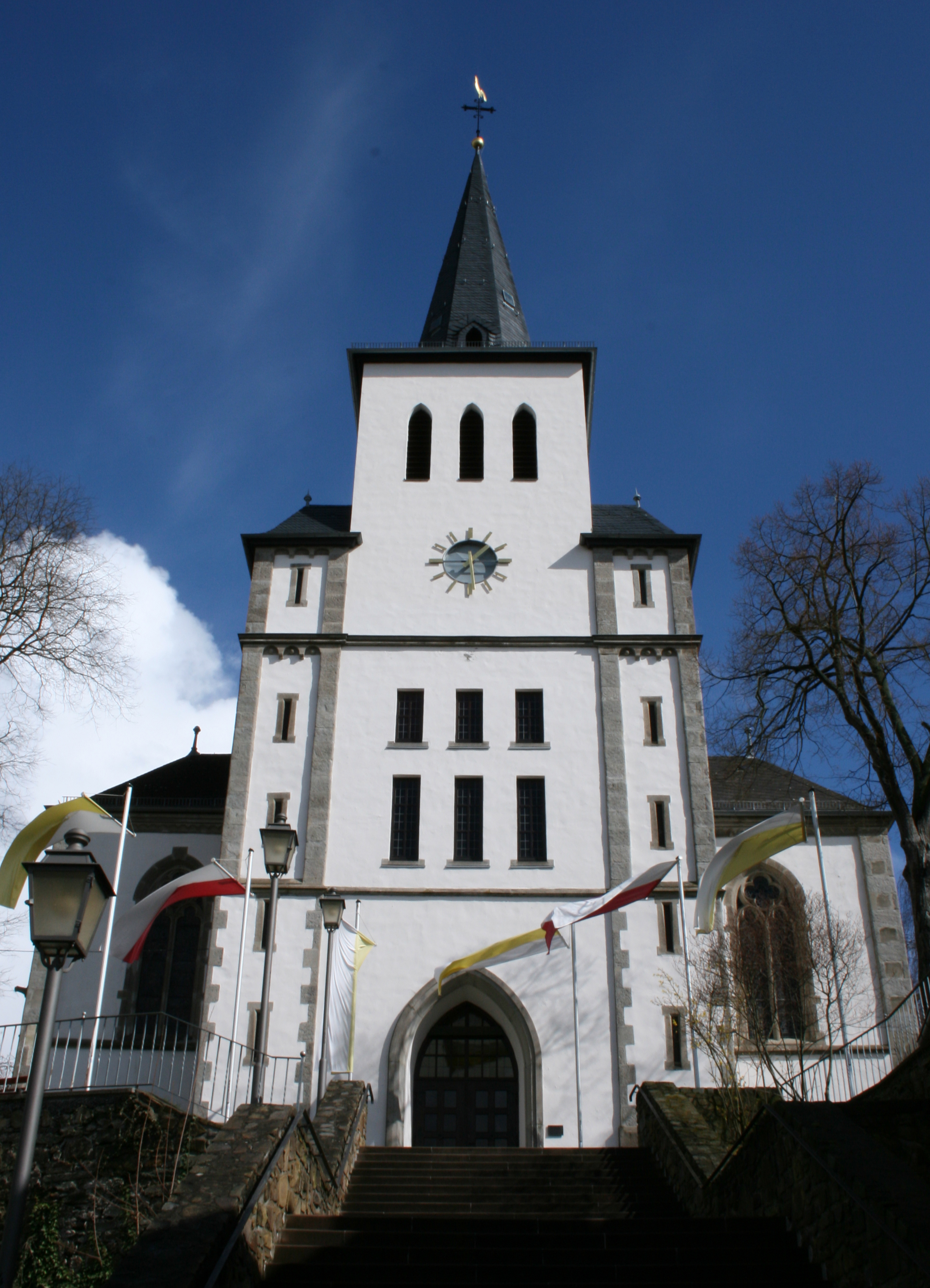 Pfarrkirche St. Maximin, Niederbrechen, Deutschland